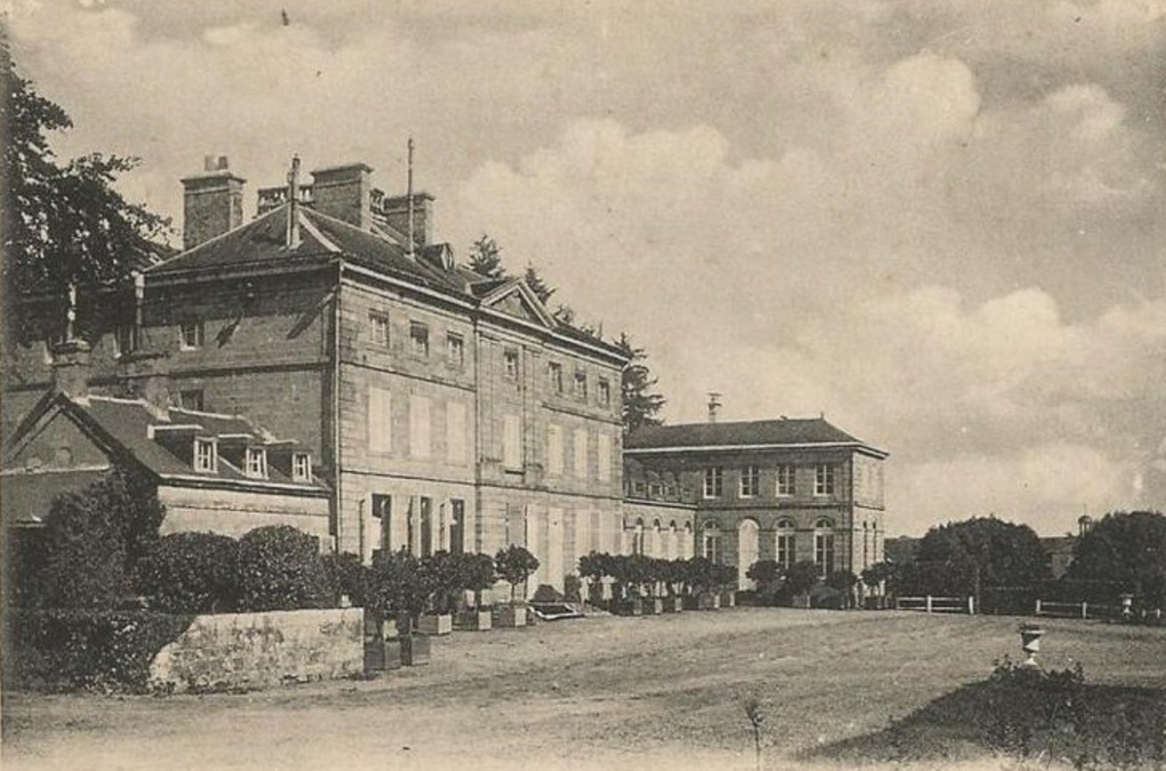 Mathilde de Montesquiou-Fézensac hérite du château de Hauteville à Charchigné dans le département de la Mayenne en 1902, mais mineure, la gestion de la propriété est confiée à sa tante Lady Hélène Standish, née de Pérusse des Cars et son oncle Lord Henry Noailles Widdrington Standish of Standish. Ce château est détruit par un incendie le 13 novembre 1922.